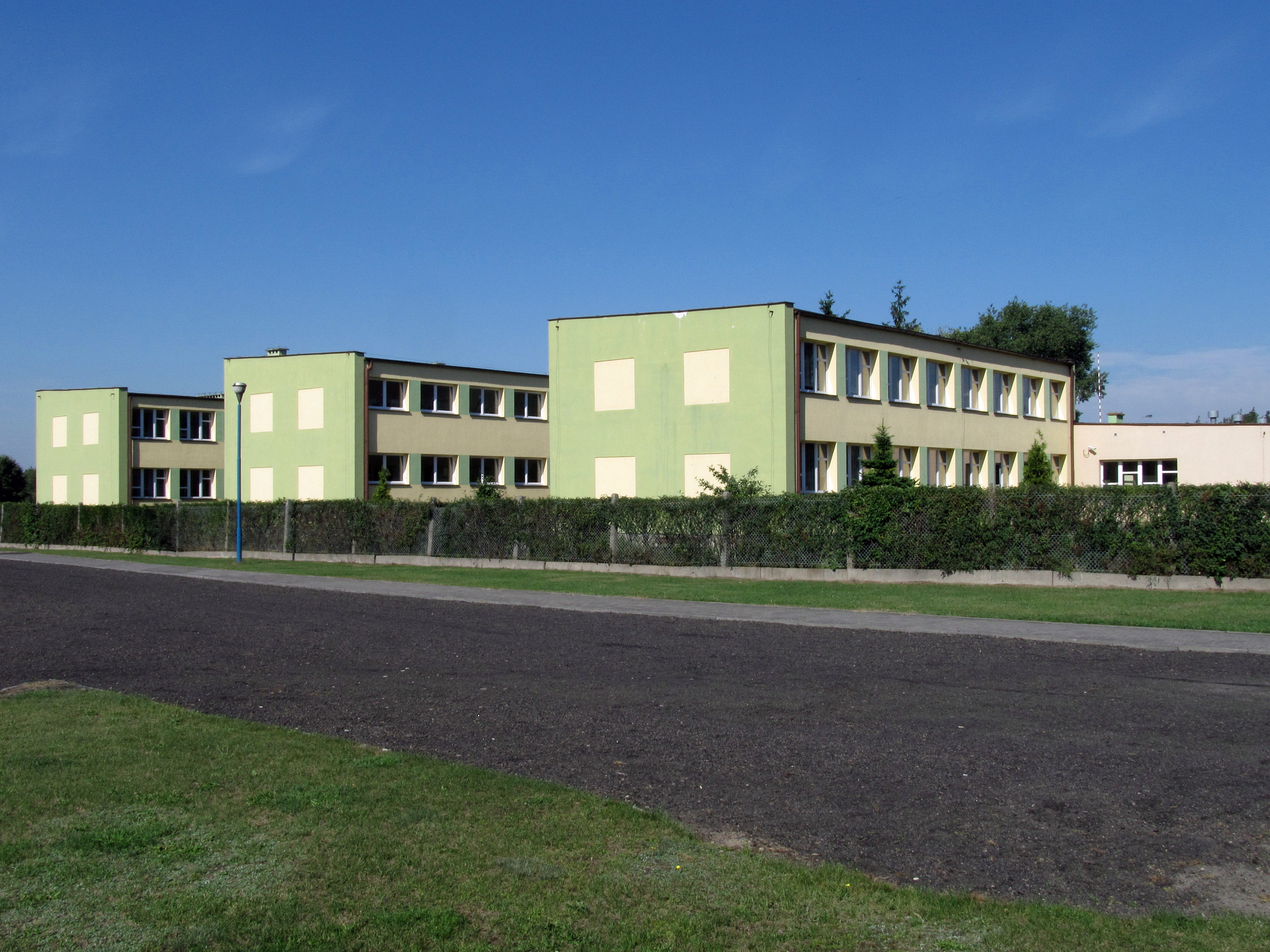 Widok na obiekt szkolny od strony stadionu miejskiego